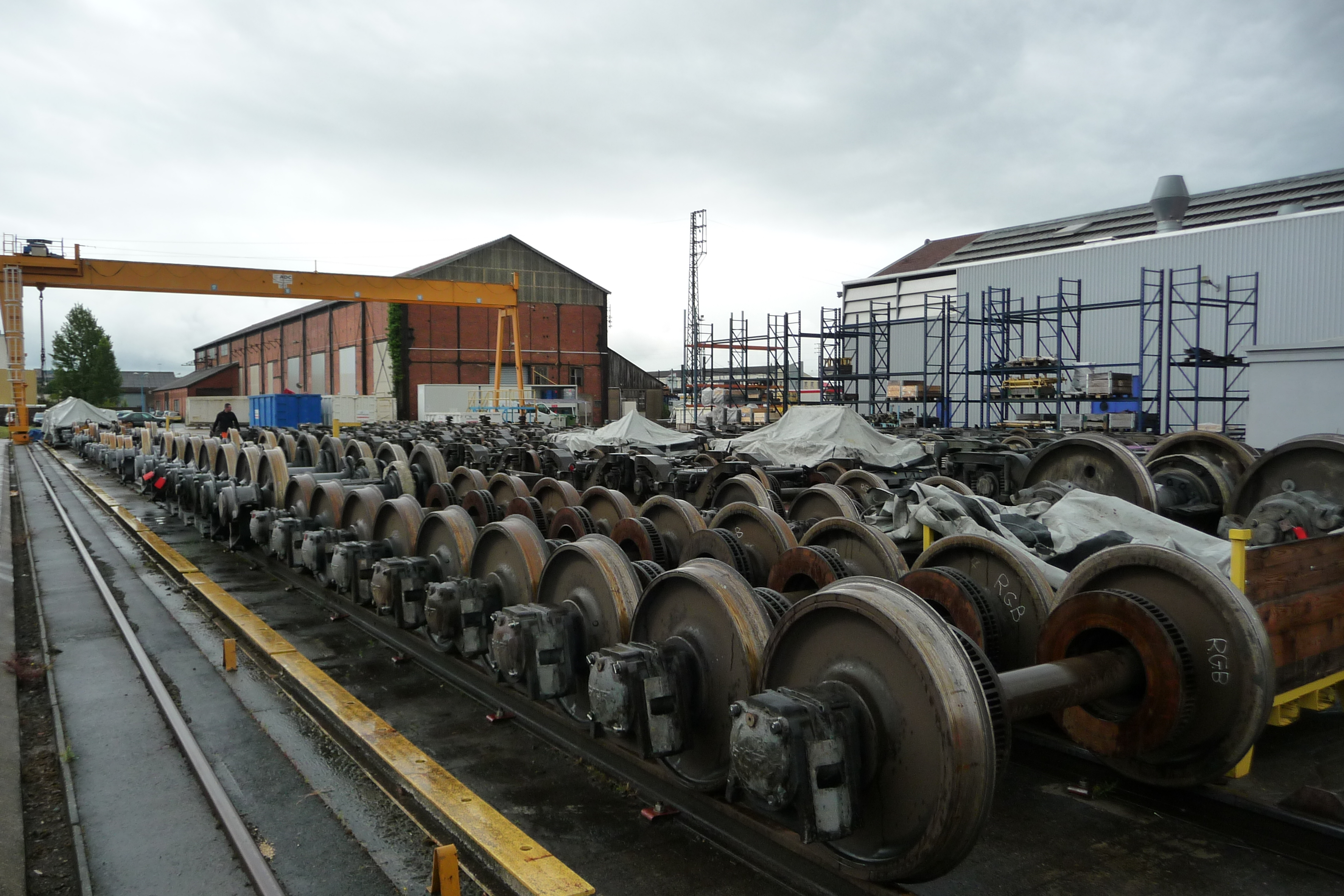 Des essieux de bogis ; site du technicentre de Saint-Pierre-des-Corps.